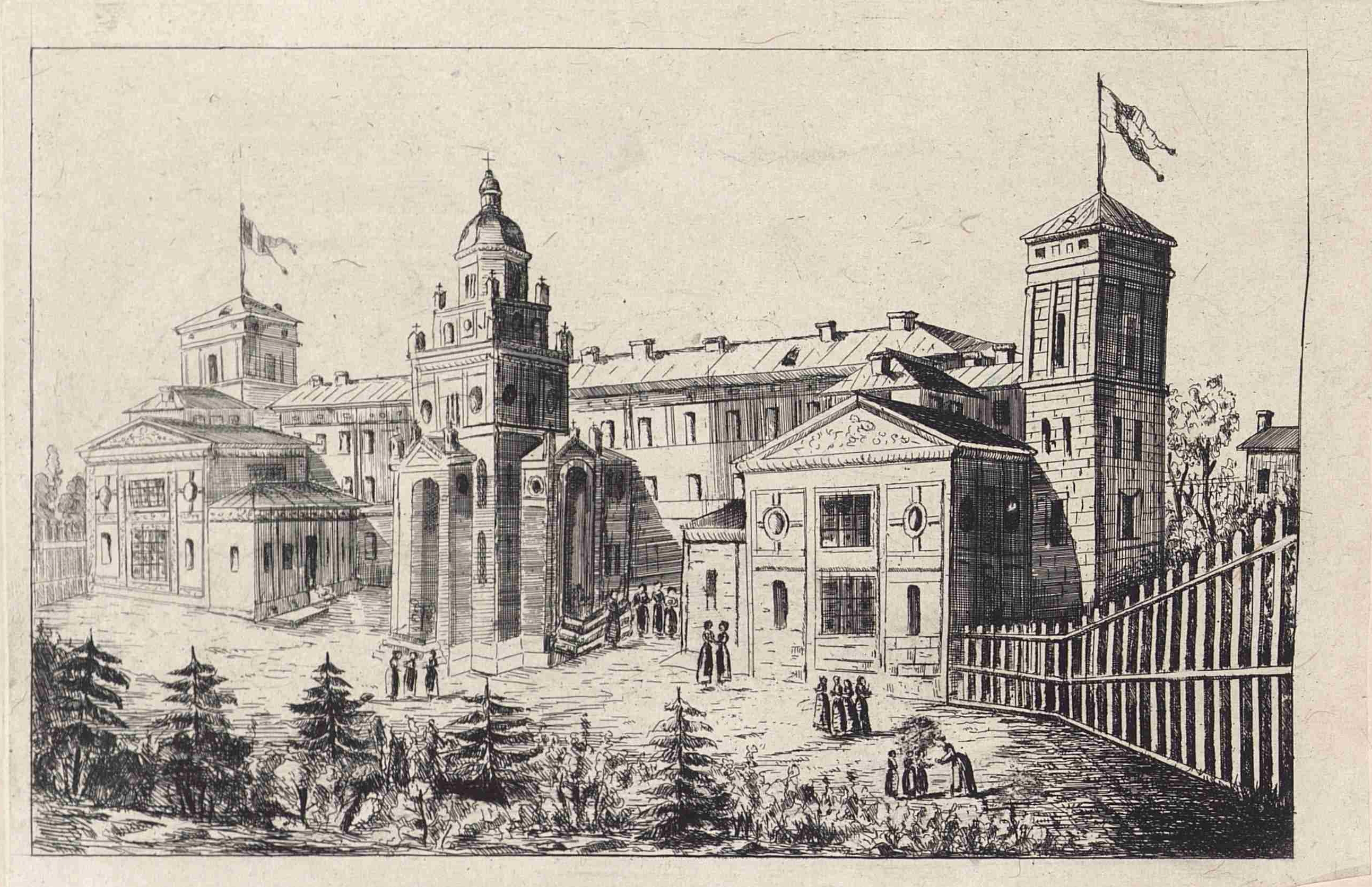 Azilul Elena Doamna